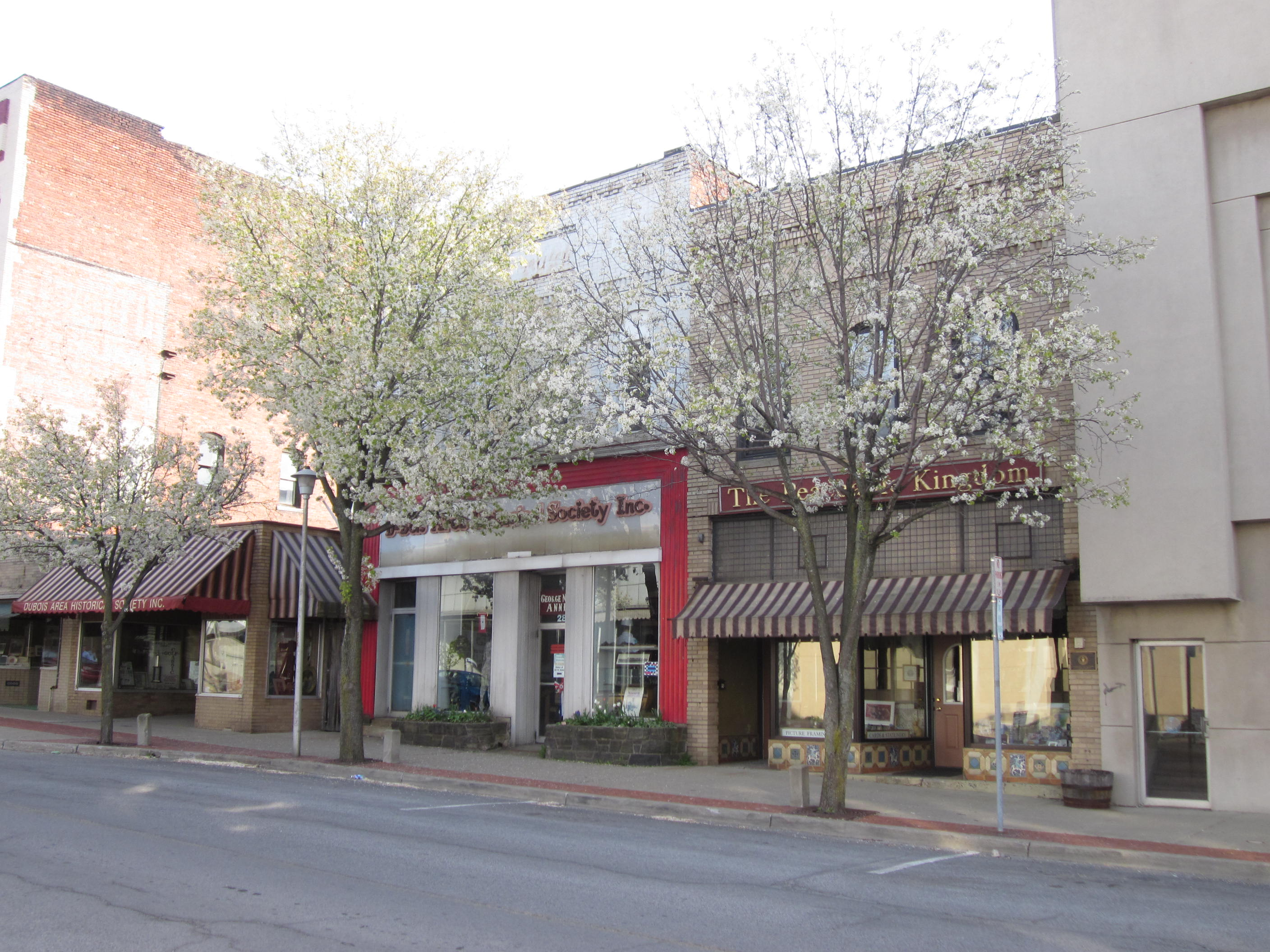 DuBois, Pennsylvania